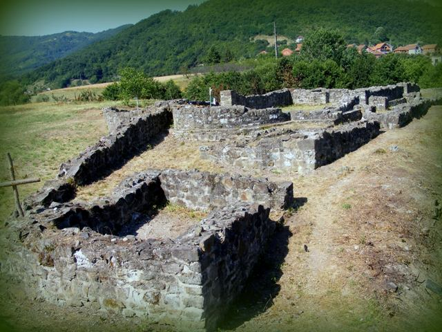 Касноантичка базилика у Куршумлији